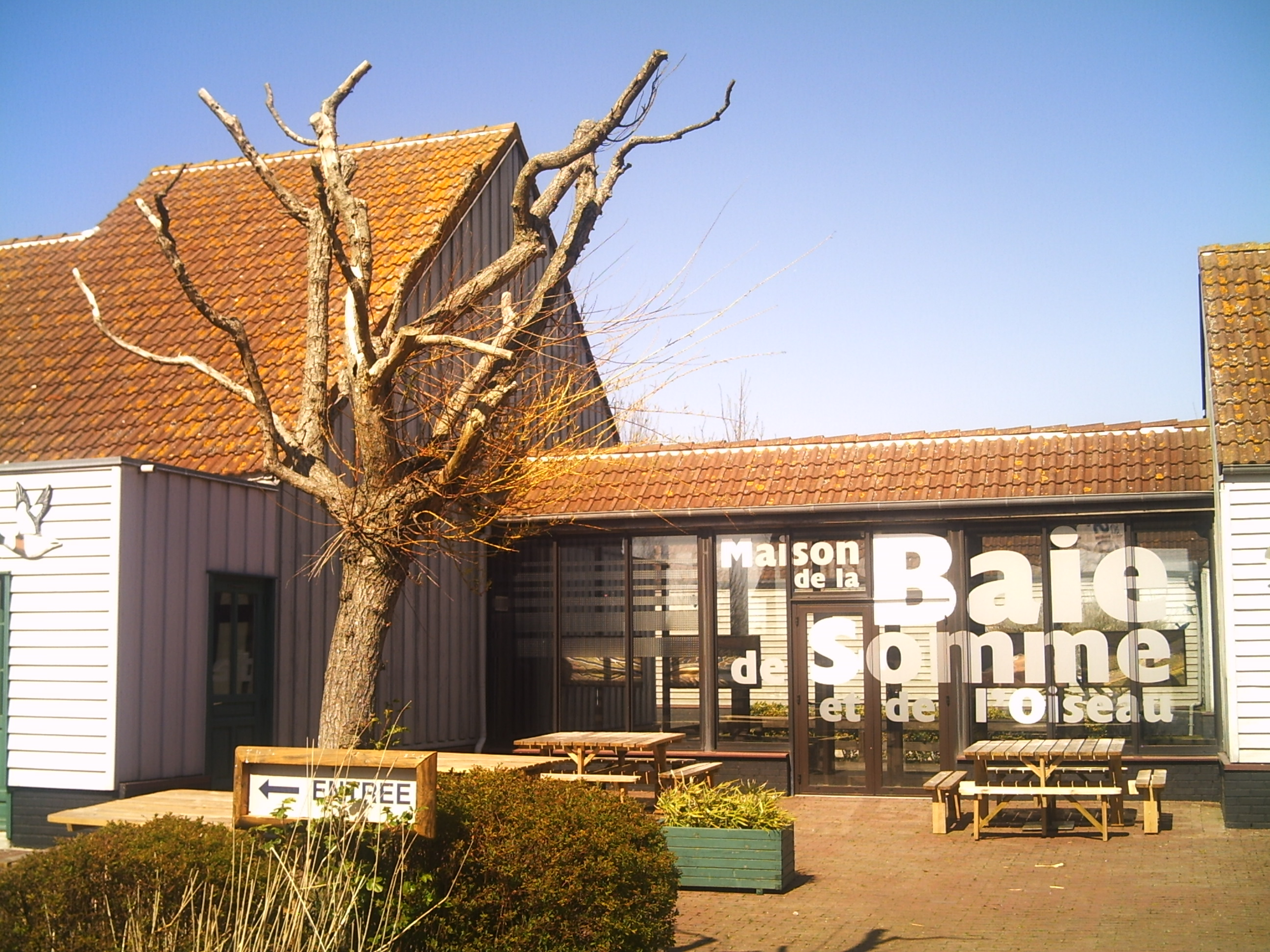 Maison de la Baie de Somme et de l'Oiseau, à Lanchères, près du Hourdel.